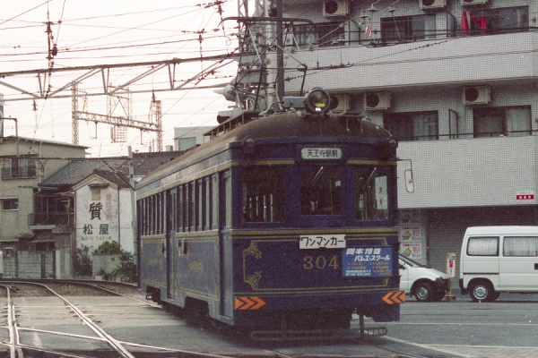 阪堺電軌モ301型モ304